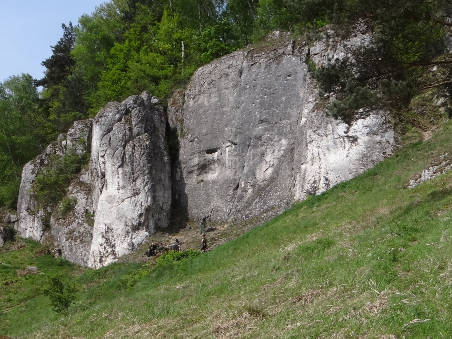 Szara Płyta w Dolinie Kobylańskiej